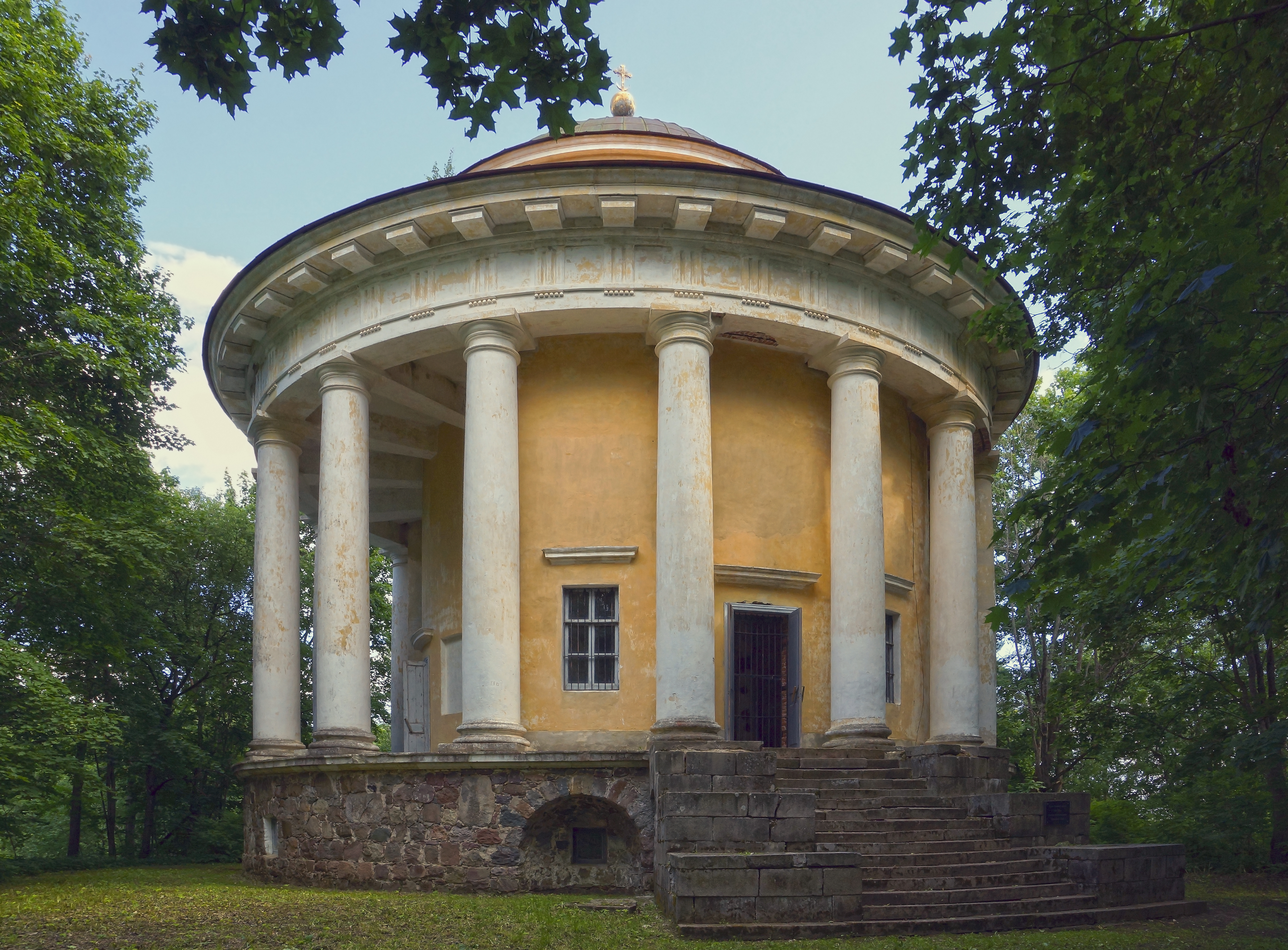 Церковь Воскресения Христова с усыпальницей (мавзолей-ротонда): Никольское (Никольское-Черенчицы), Торжокский район, Тверская область